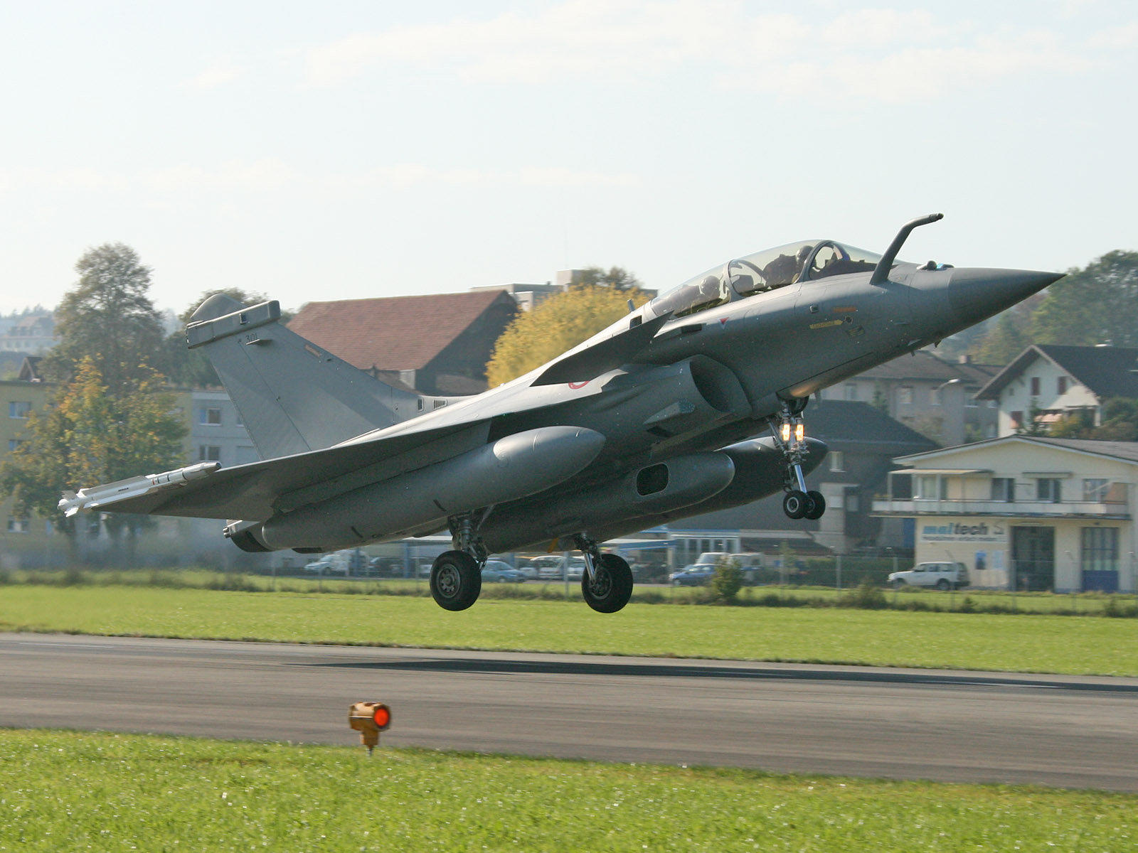 France Air Force Dassault Rafale B 301 in Emmen